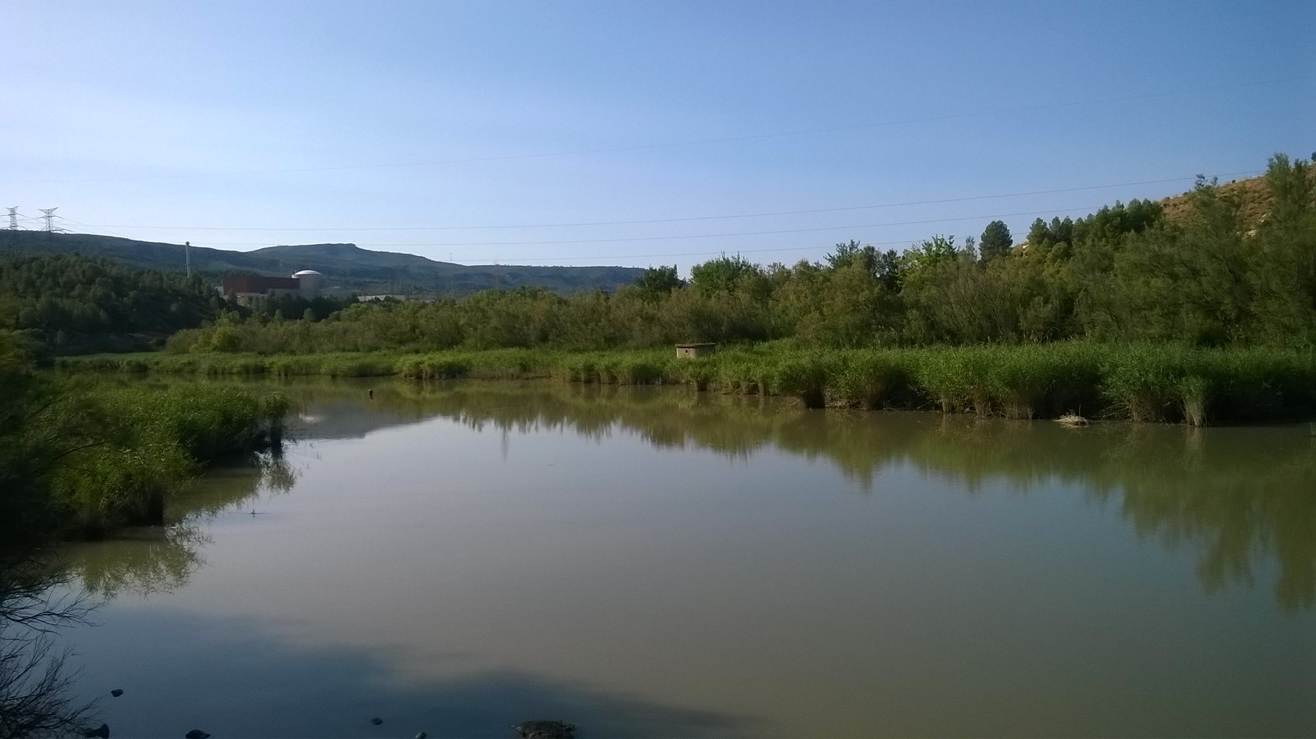 Vistas de Cofrentes tomadas durante el verano de 2014 por Isabel Valiente de la Granja.